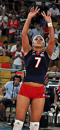 La pallavolista Niverka Marte